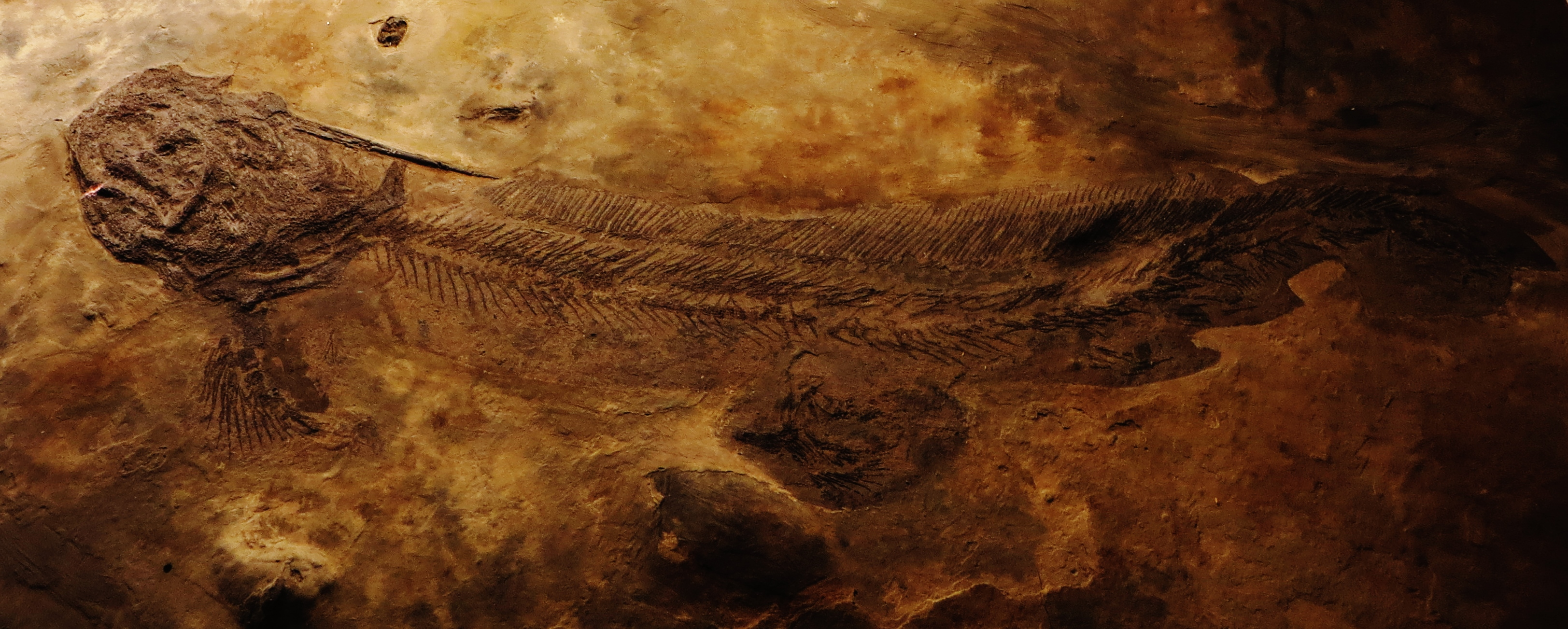 Fossil of Triodus, an extinct fish- Took the picture at Museum of Paleontology, Tuebingen